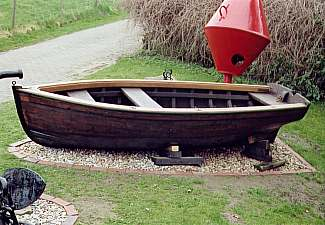 Eiskahn vor dem Kehdinger Küstenschiffahrtsmuseum